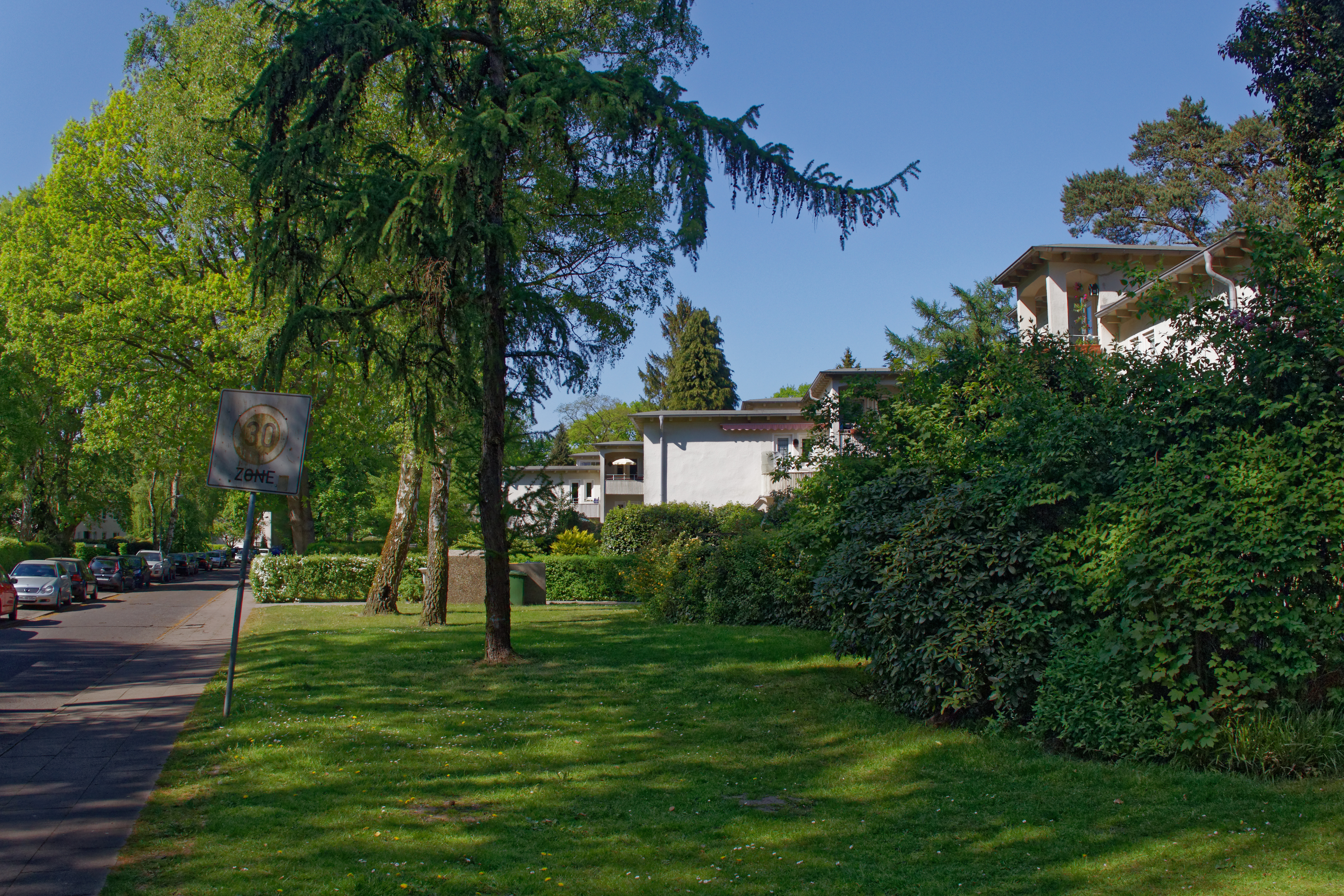 Hamburg-Rissen, Siedlung Mechelnbusch, Südende der Straße MechelnbuschThis is a photograph of an architectural monument.